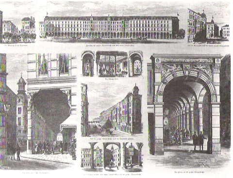 Darstellung der Colonnaden in der Hamburger Neustadt in der Allgemeinen Illustrirten Zeitung im Jahr 1880